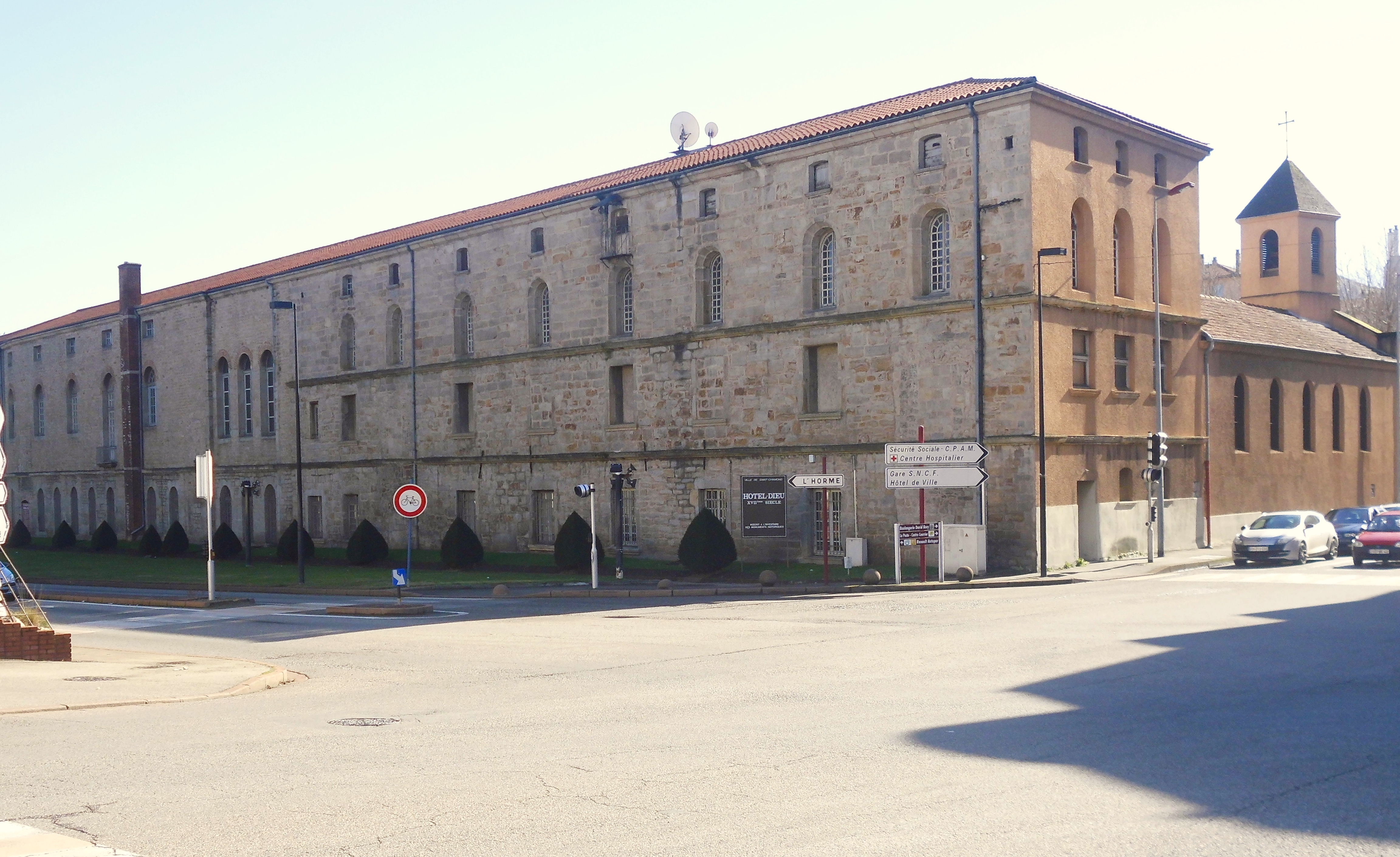 Saint-Chamond (Loire), l'Hôtel-Dieu, 12 février 2014.